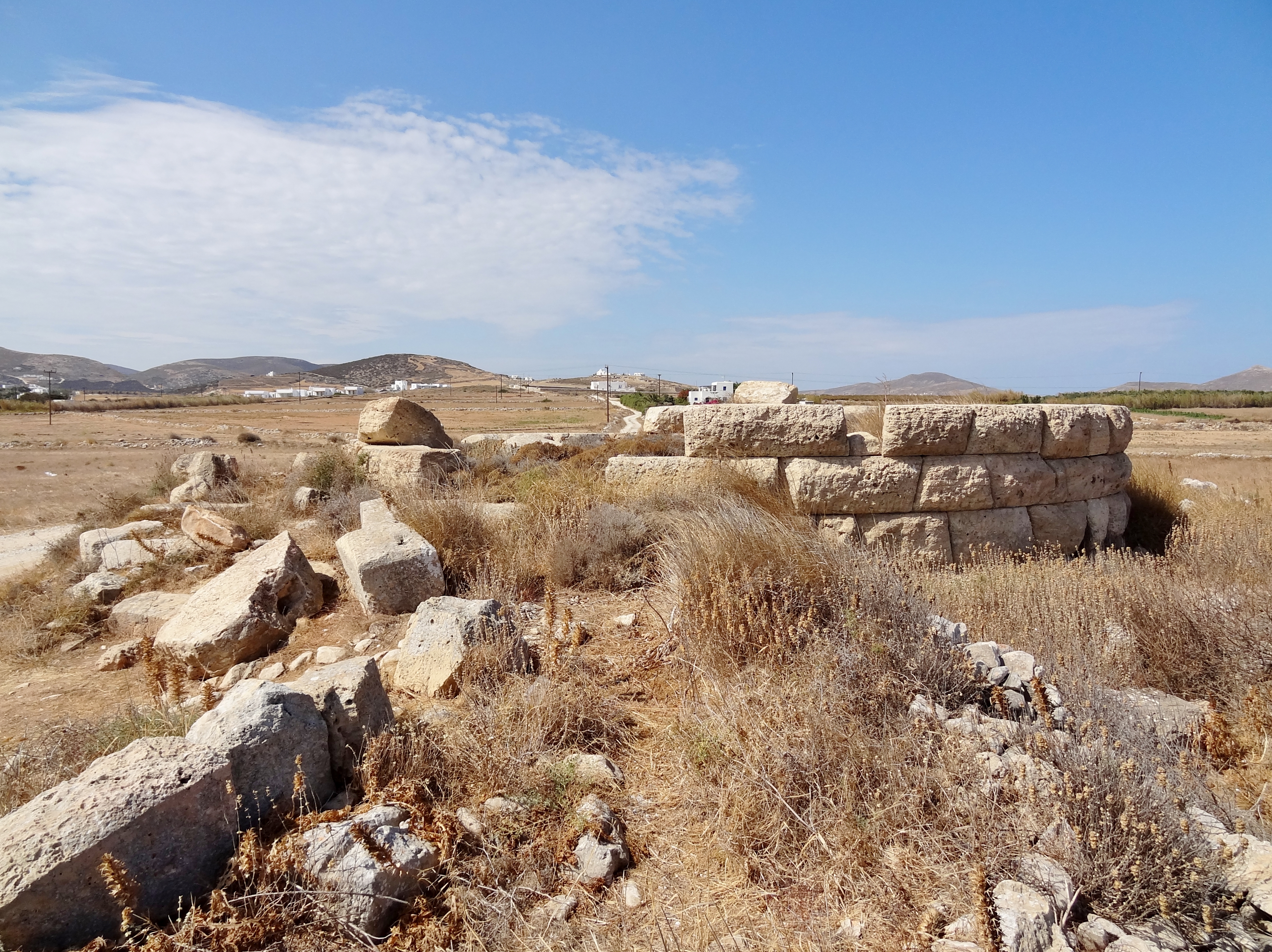 Reste eines Turmes der hellenistischen Epoche bei Naousa auf Paros, Kykladen, Griechenland